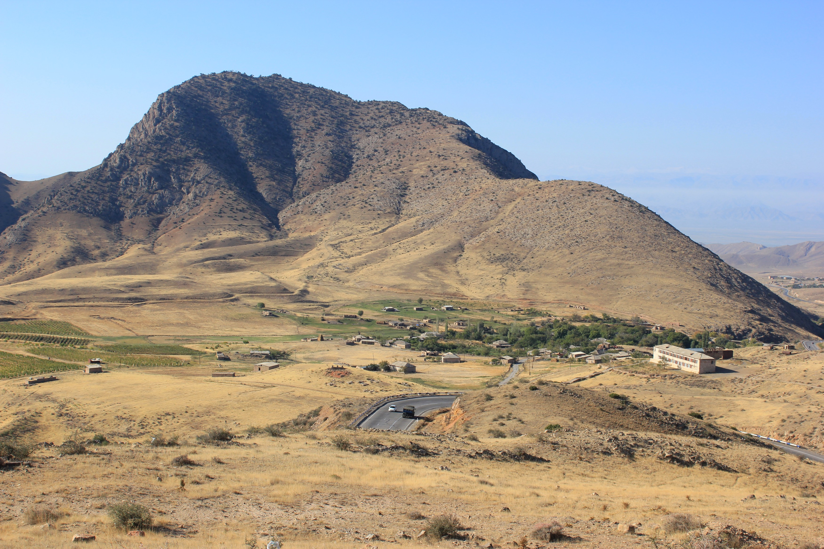 Ansicht der aserbeidschanischen Exklave Kərki (armenisch Tigranaschen) in Armenien. This map may be incomplete, and may contain errors. Don't rely solely on it for navigation.